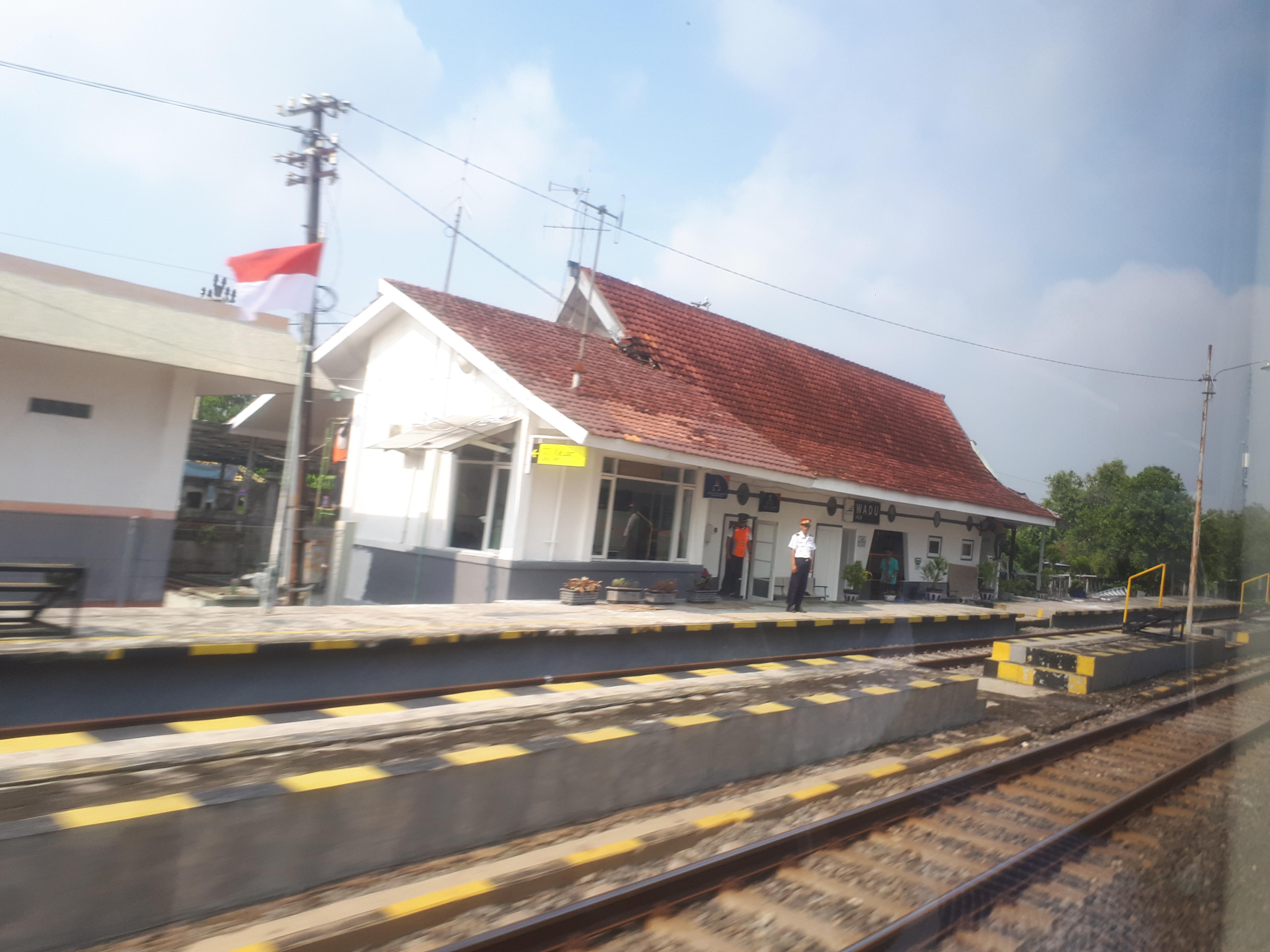 Stasiun Wadu tahun 2020